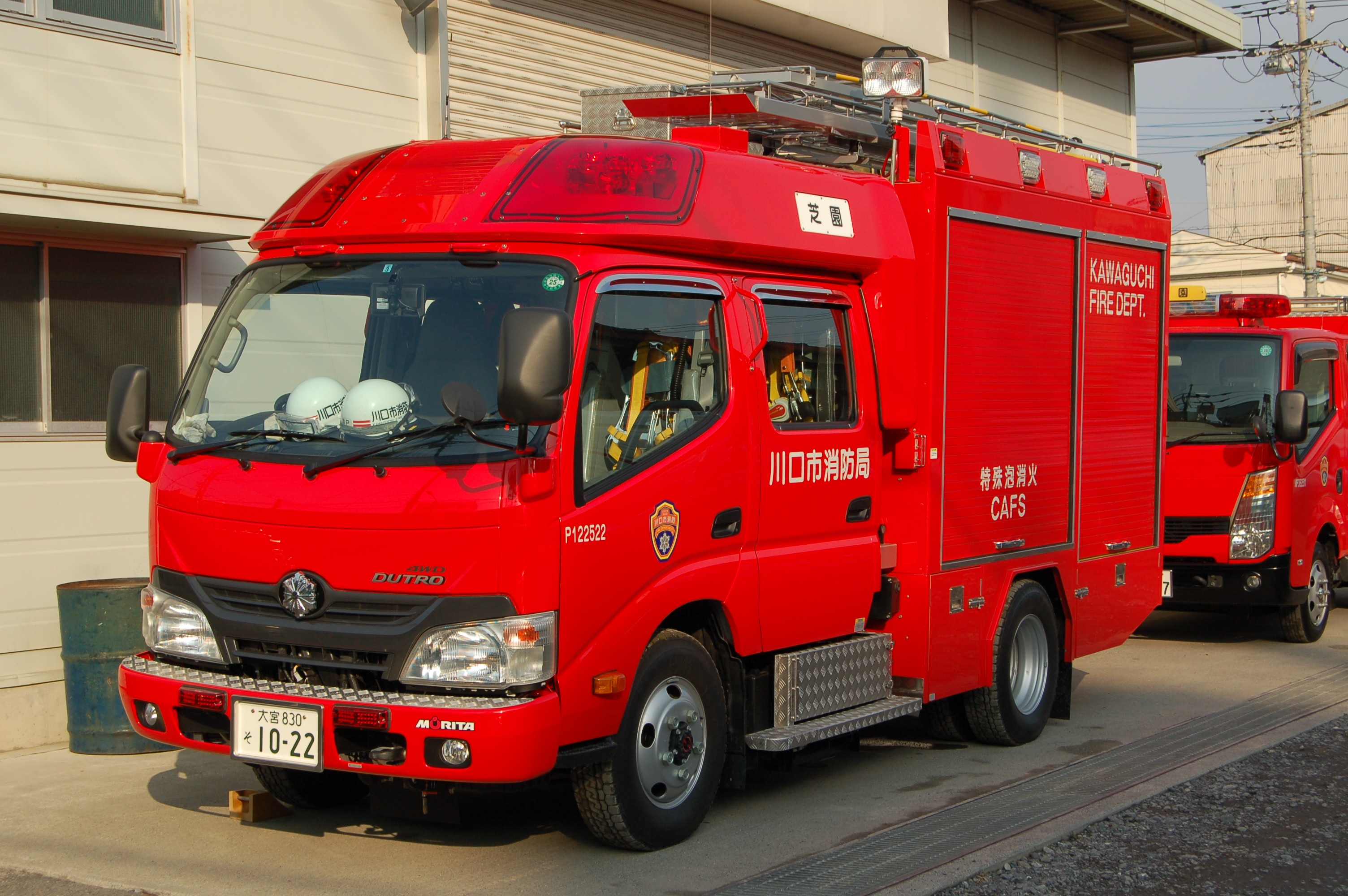 川口市消防局北消防署芝園分署ポンプ車